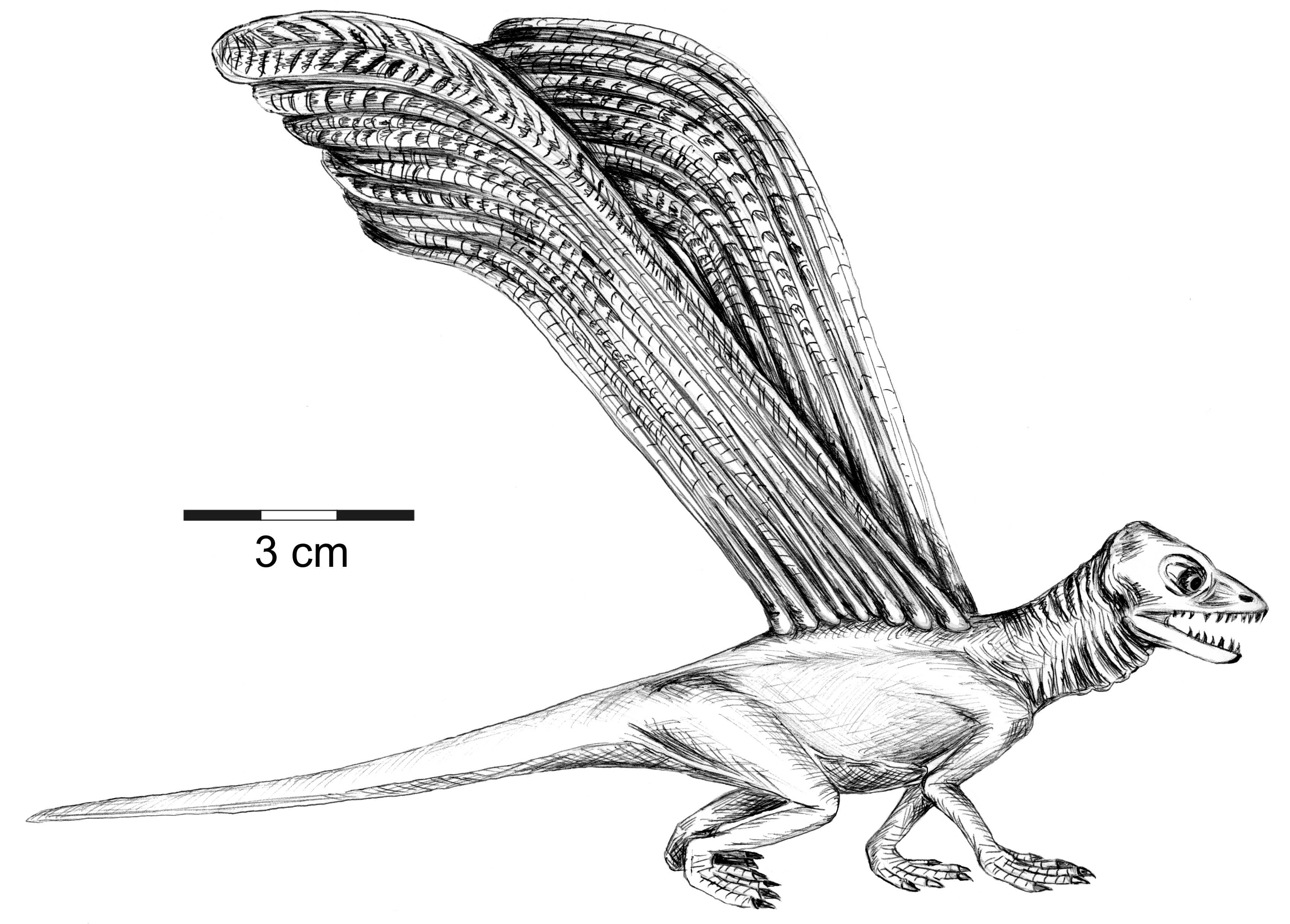 Lebendrekonstruktion des fossilen diapsiden Reptils Longisquama insignis aus der Oberen Trias von Kirgisien. Die Rekonstruktion der verlängerten am Rücken ansetztenden Schuppen als paarige verstellbare Tragflächen beruht auf der von Haubold & Buffetaut (1987) veröffentlichten Interpretation des Reptils als Gleitflieger. Der Hinterleib einschließlich des Schwanzes und der Hintergliedmaßen sind bei dem zugrunde liegenden Skelettexemplar nicht erhalten.